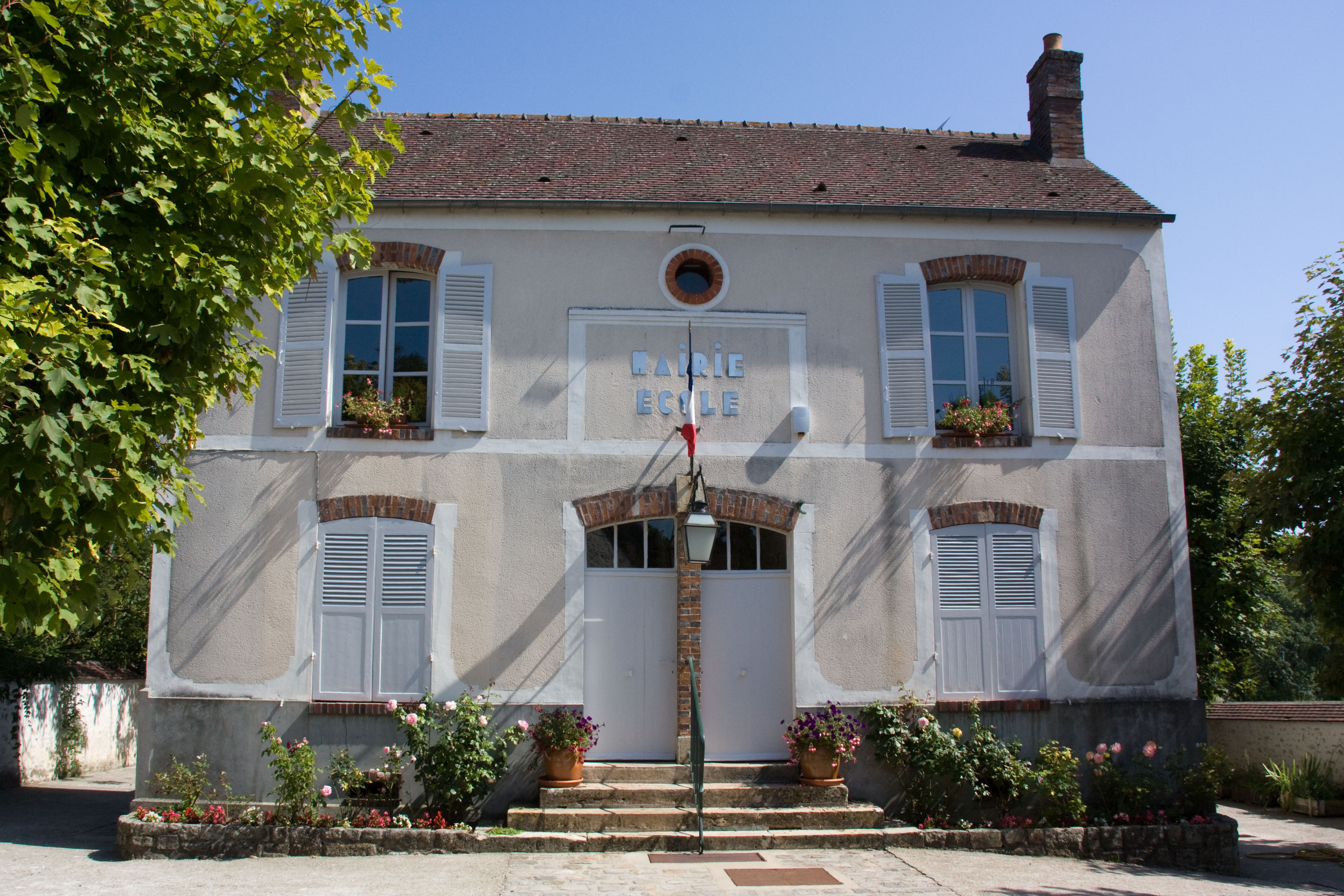 Mairie de Boigneville, Boigneville, Essonne, France